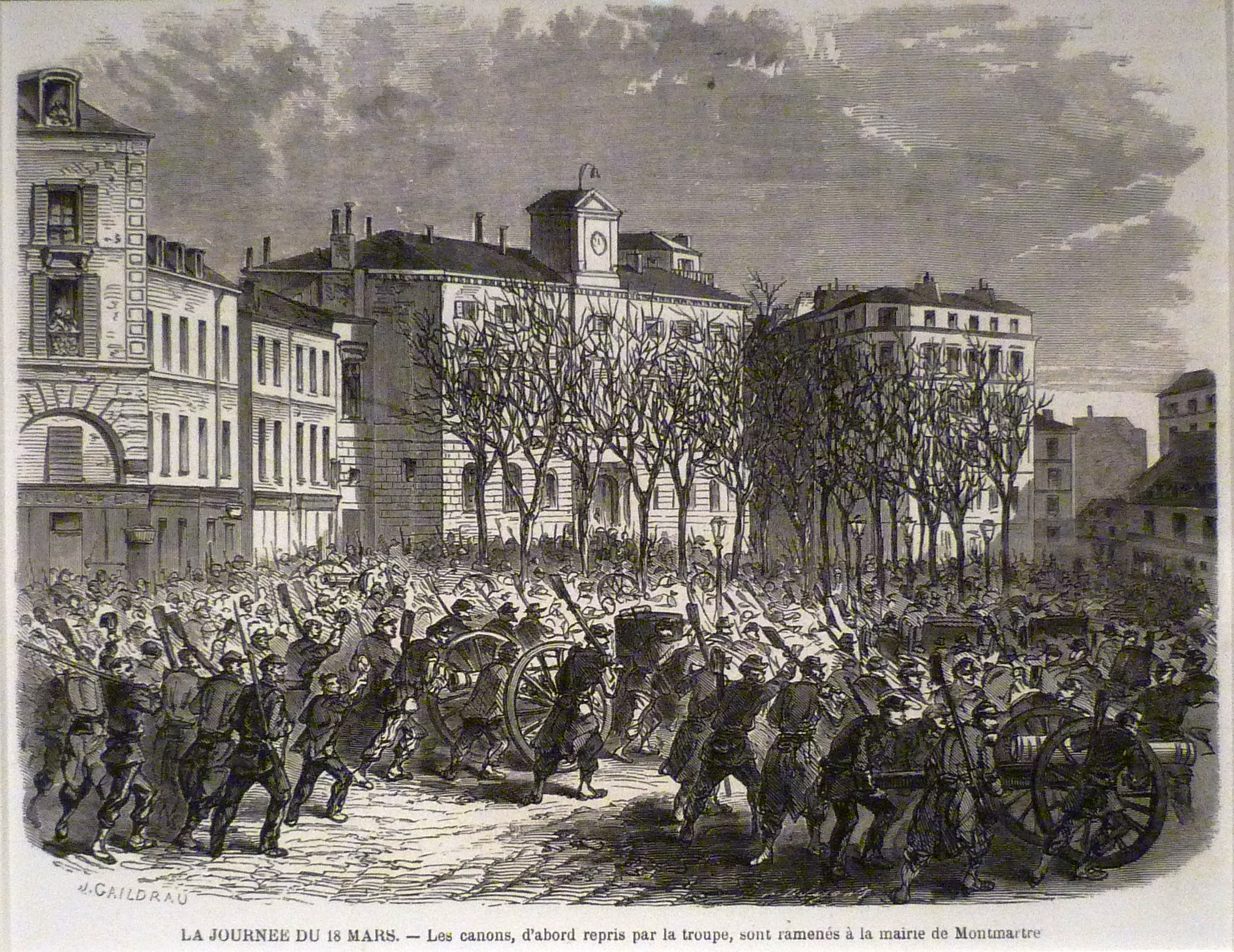 Exposition La Commune de Paris à l'Hôtel de Ville de Paris (18 mars - 28 mai 2011) - Arrivée des canons repris à l'armée devant la mairie du 18 e arrondissement, le 18 mars 1871 - Gravure de J. Gaildrau pour L'Illustration du 25 mars 1871.